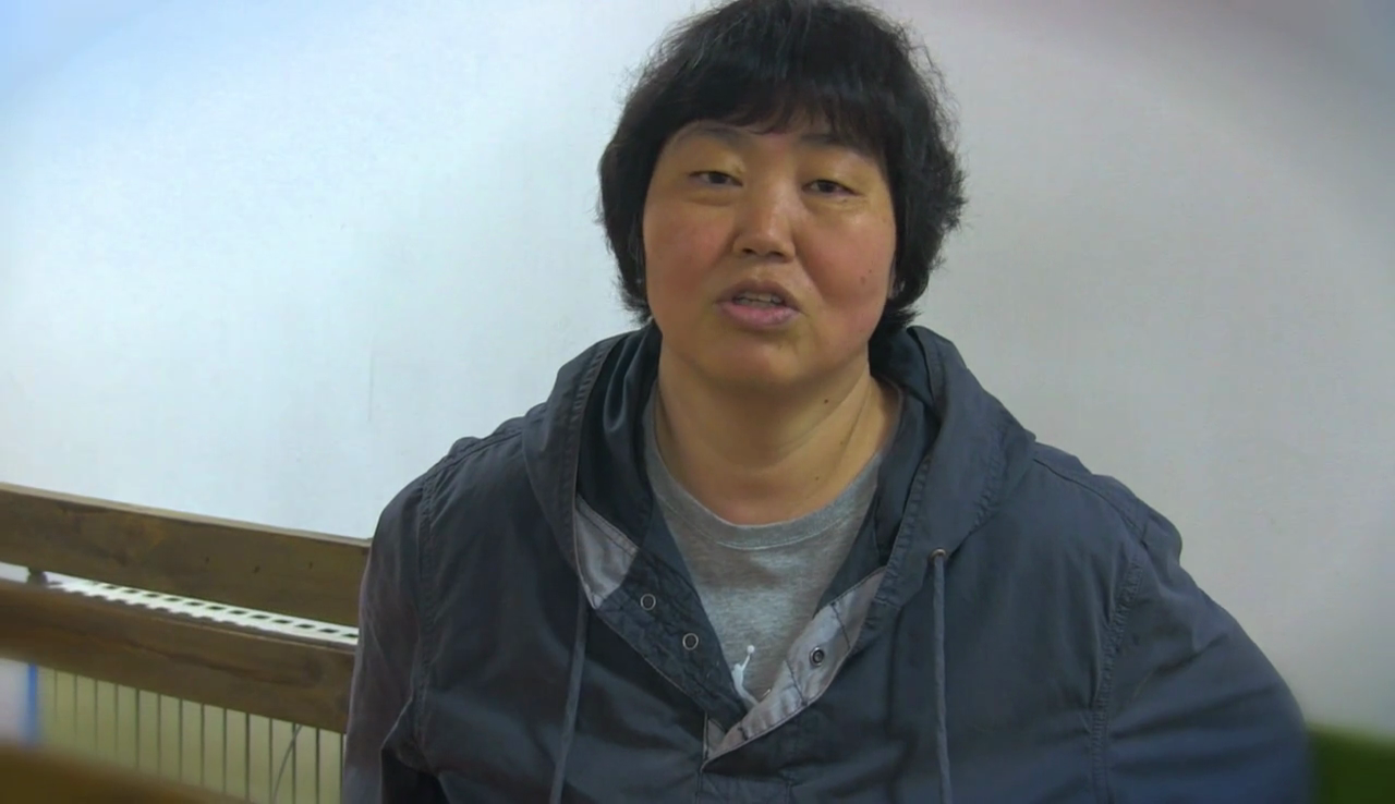 임순례 감독 2014년 서울국제여성영화제 홍보 영상 스크린 캡처